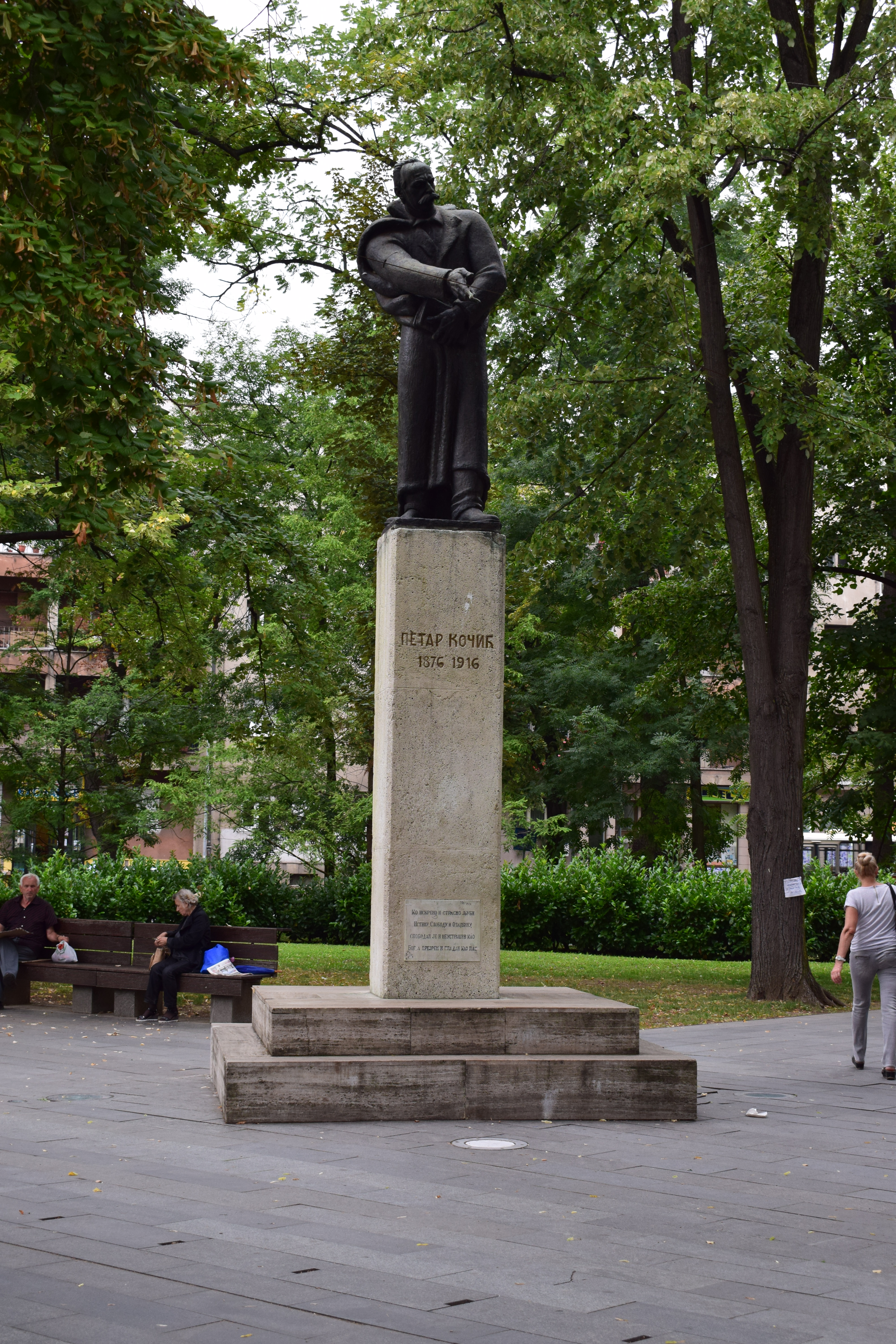 Споменик књижевнику и народном трибуну Петру Кочићу (1877-1916) налази се у Градском парку (прекопута главног трга), и представља још један рад Антуна Аугустинчића у Бањалуци и Вање Радауша. Споменик је завршен 1929, а постављен је и свечано откривен 6. новембра 1932. године.